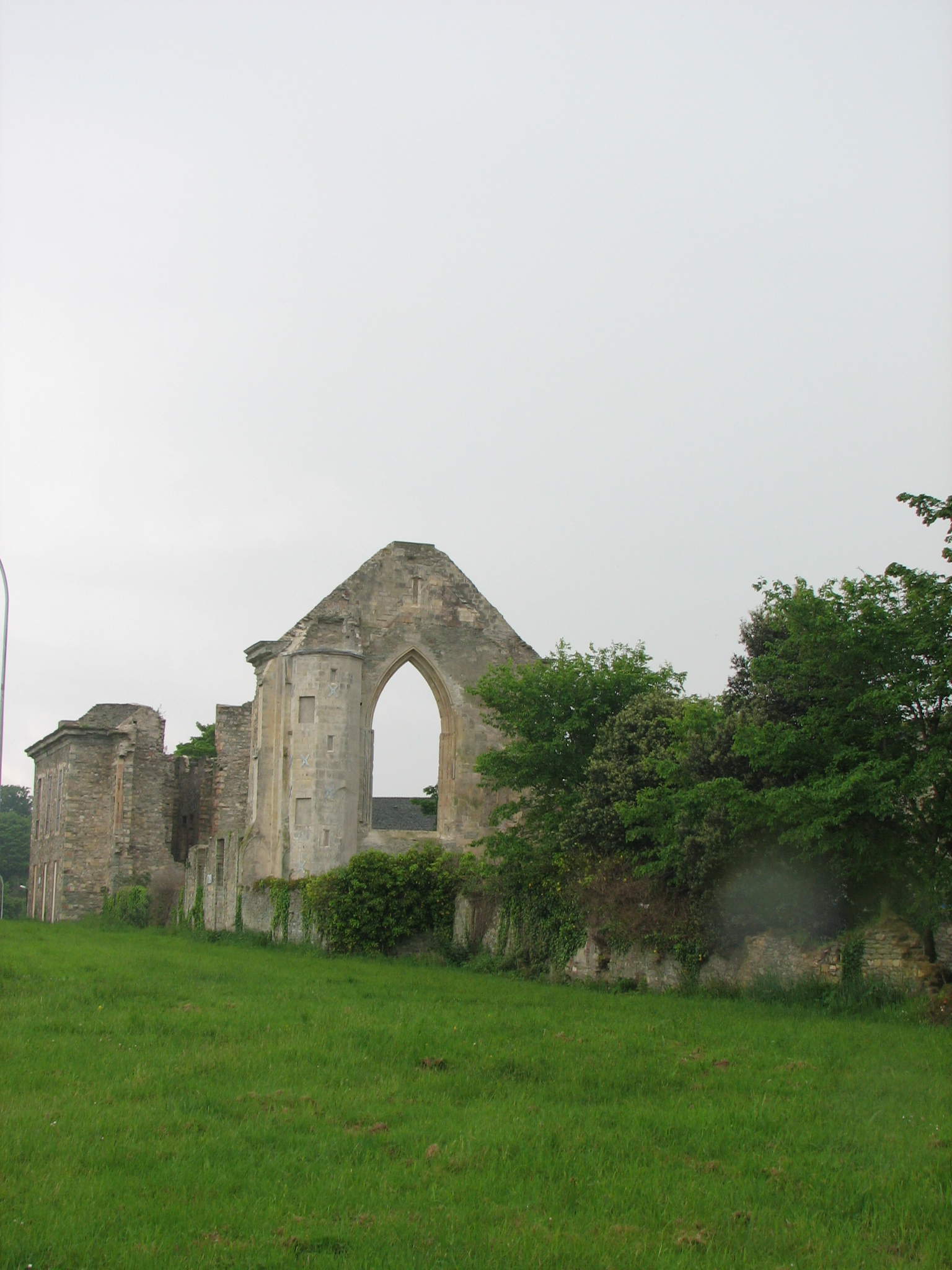 Eglise abbatiale Notre-Dame-du-Voeu à Cherbourg